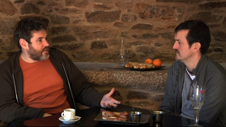 Jorge Coira, esquerda, e Rubén Ruibal nunha entrevista no 2012.